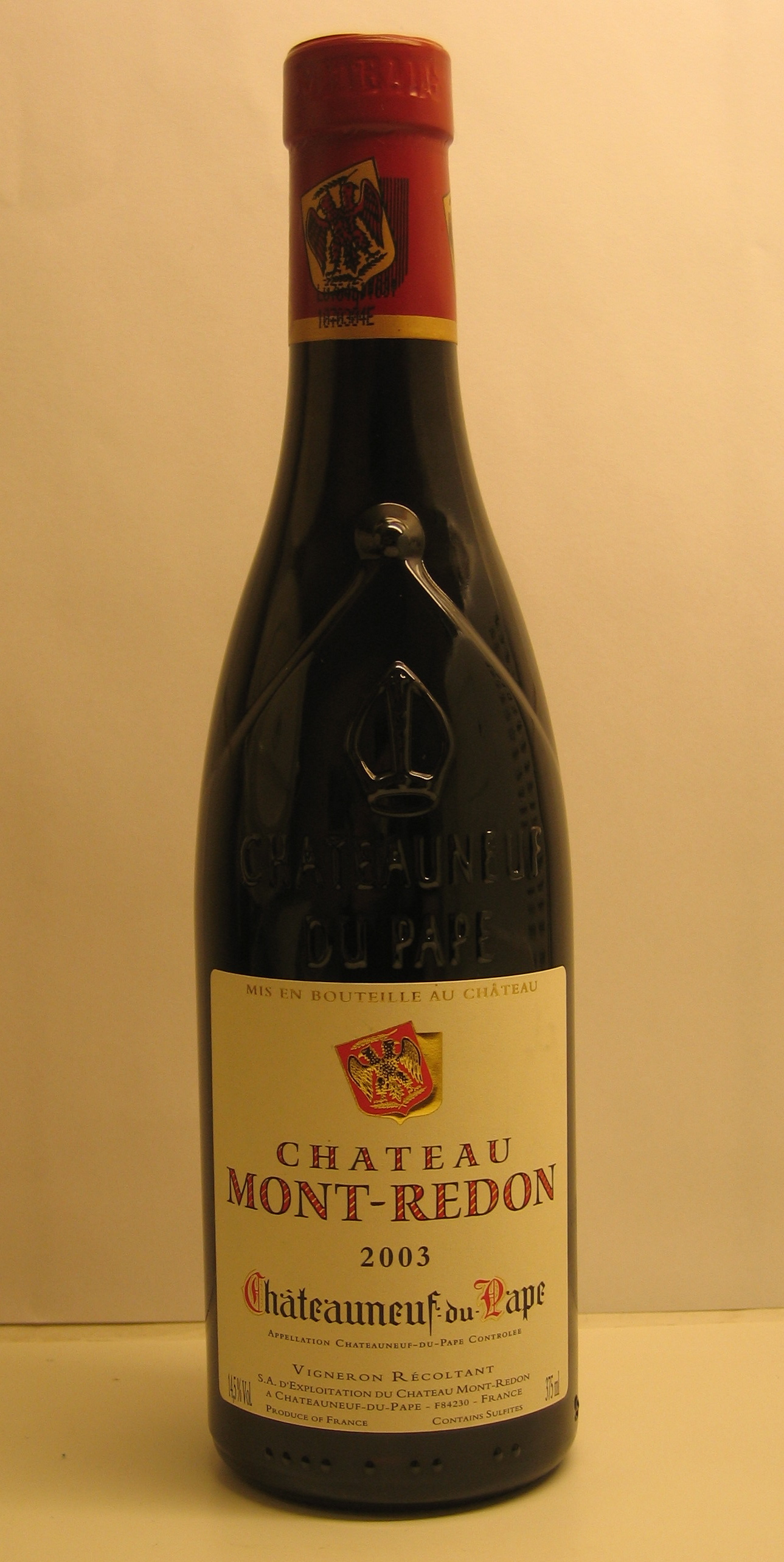 Demi-bouteille (half bottle) of Château Mont-Redon 2003, AOC Châteauneuf-du-Pape